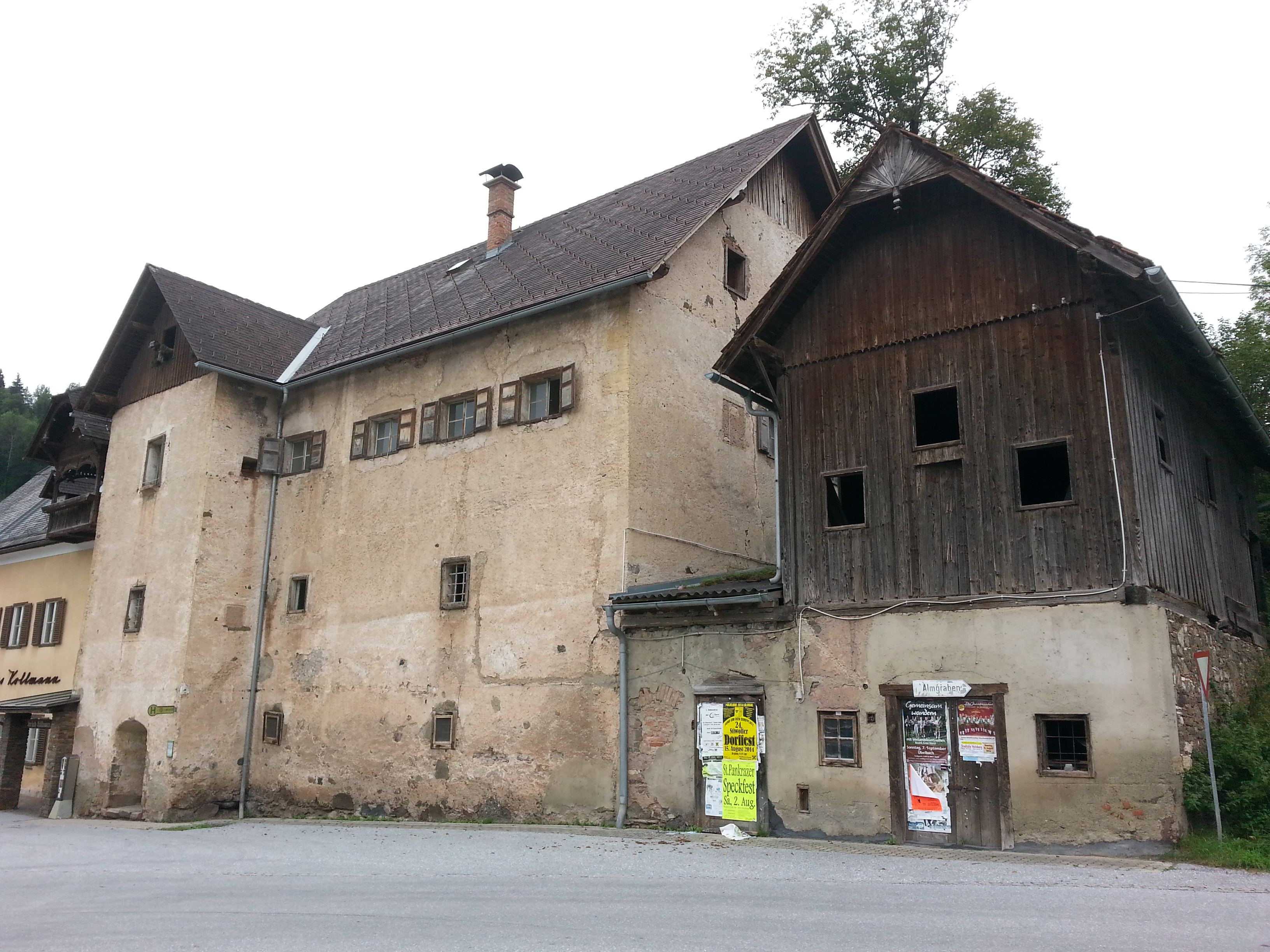 Sog. Buchhaus, ehem. Amtshaus des Stiftes Rein